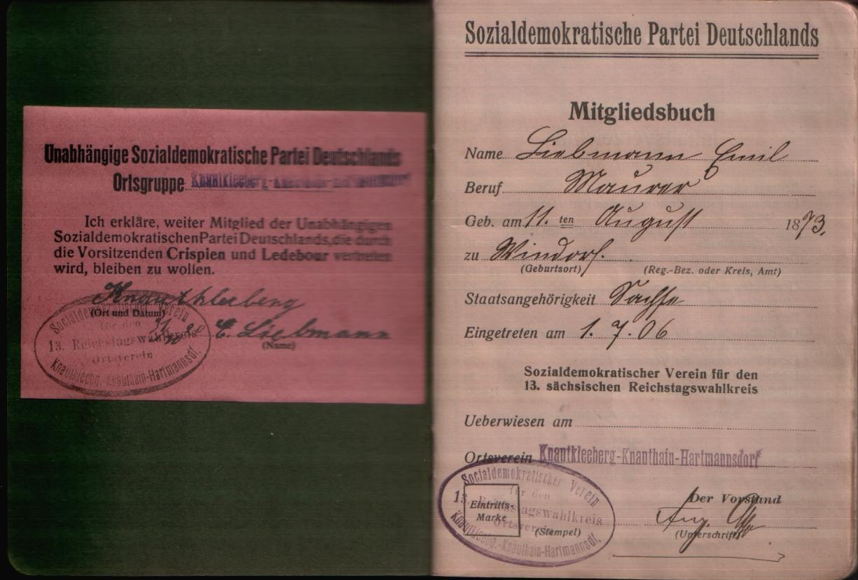 Parteibuch der USPD (vormalig SPD), ab 1906 bis 1921